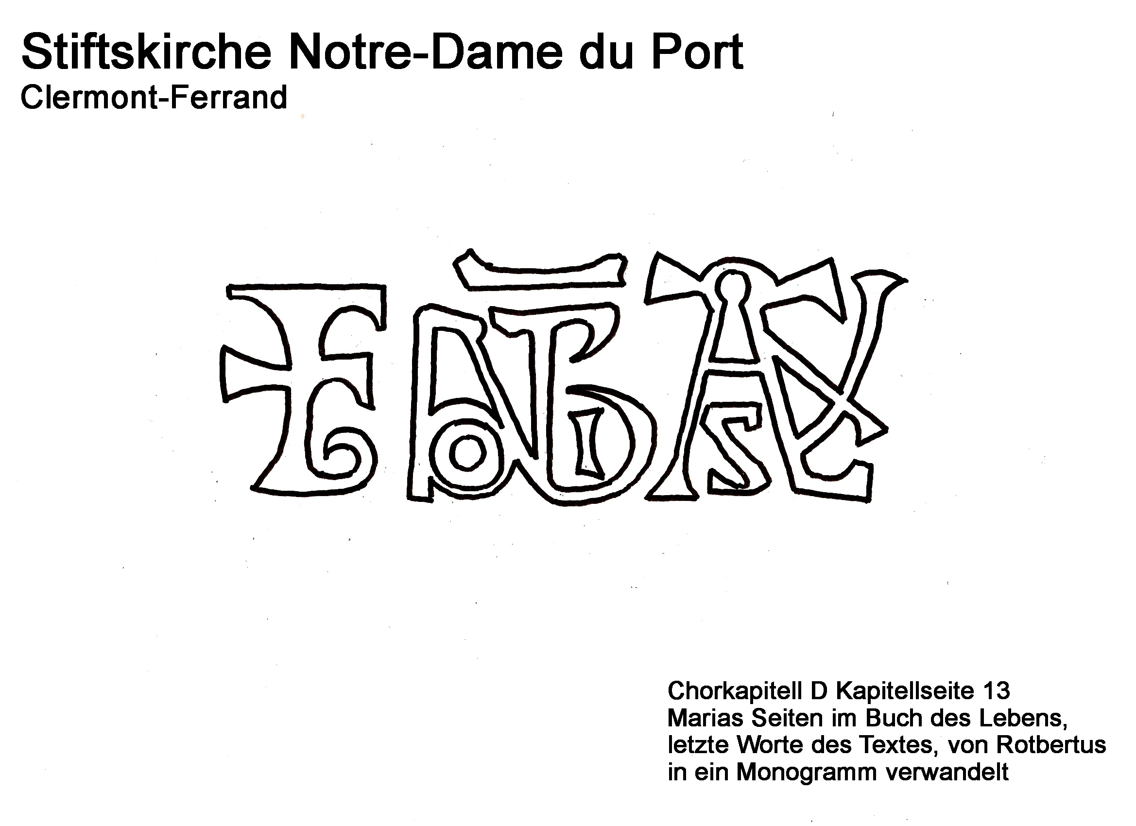 Notre-Dame du Port, lat. Monogramm